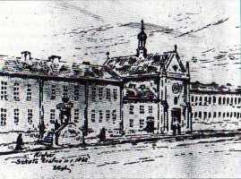 Szkoła Realna w Kielcach, XIX w.